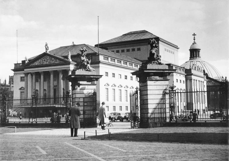 Berlin, Blick von der Universität zur Staatsoper Unter den Linden, im Hintergrund rechts die St. Hedwigskathedrale.